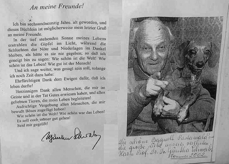 Günther Schwabs farewell letter. Taken at the wall in the chapel Tanzstatt [1] Wölzer Tauern.